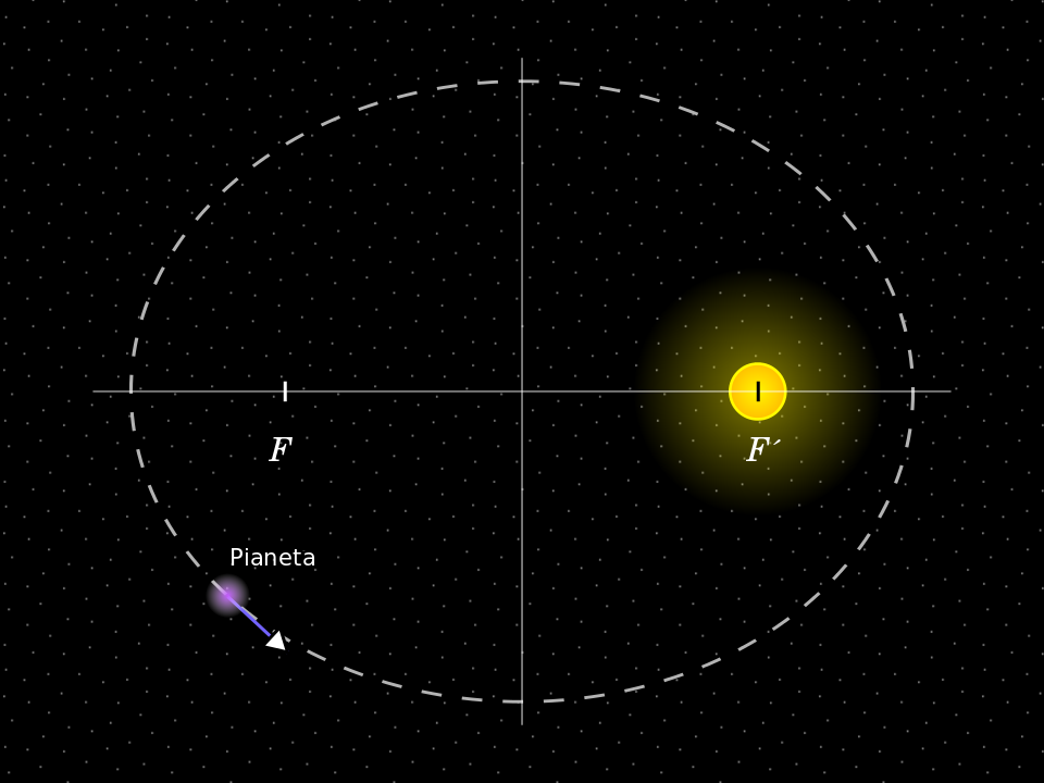 Schema della prima legge di Keplero, che raffigura l'orbita di un pianeta (come la Terra) descrivere un'ellisse, di cui il Sole occupa uno dei due fuochi.